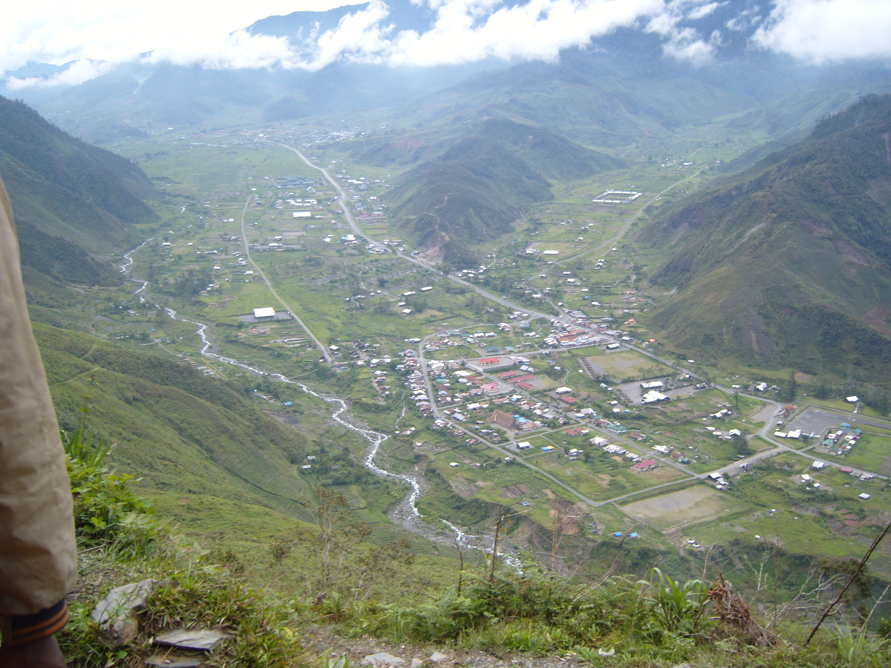 Mulia City-Prov/Papua/Indonesia